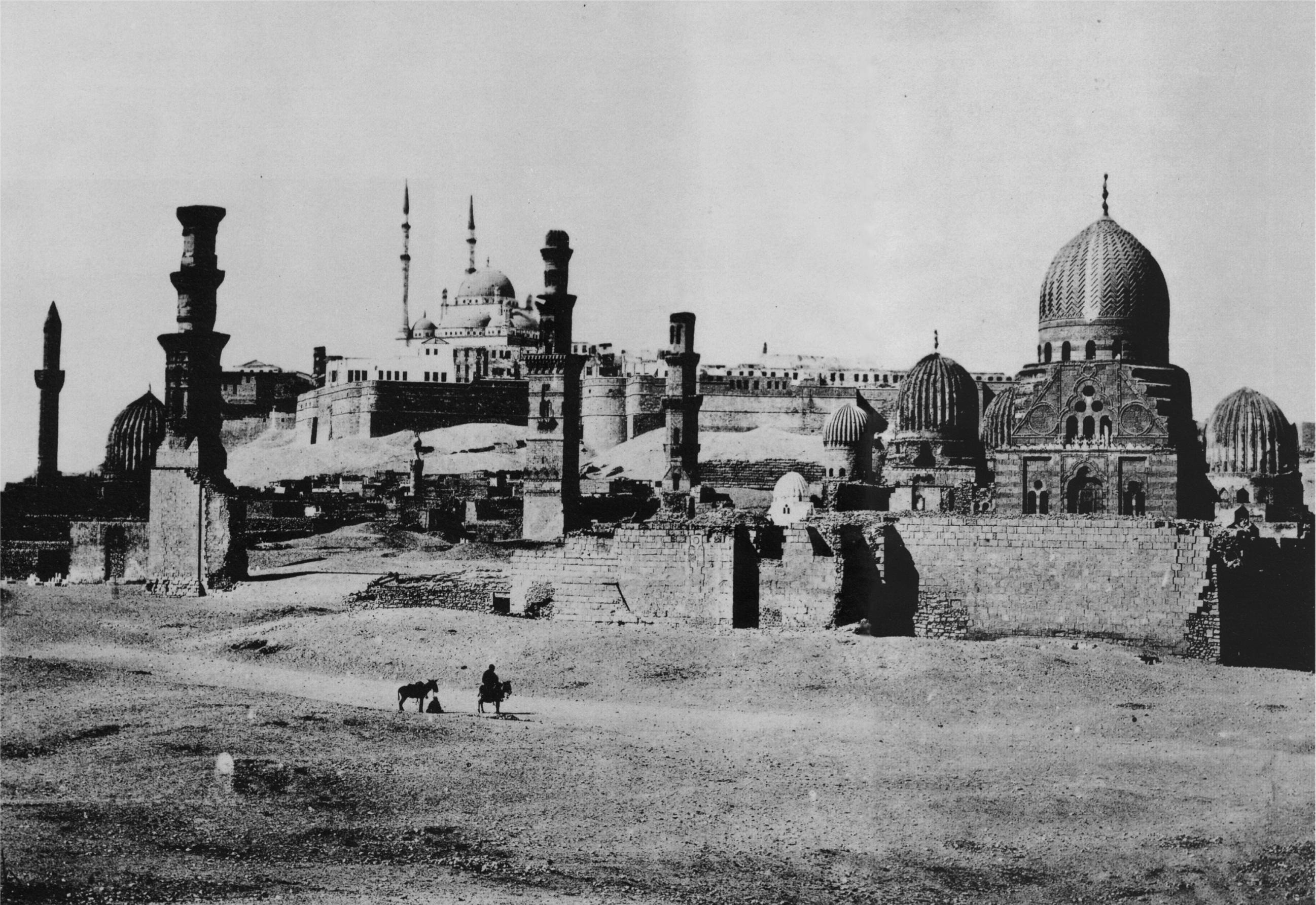 Die Fotografie zeigt den Kairoer Südfriedhof El-Karafa und dahinter die Zitadelle aus dem 12. Jahrhundert mit der noch unvollendeten Alabastermoschee